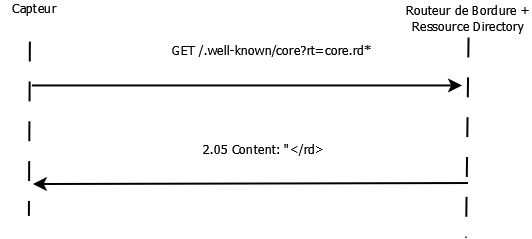 Decouverte wellknown RD